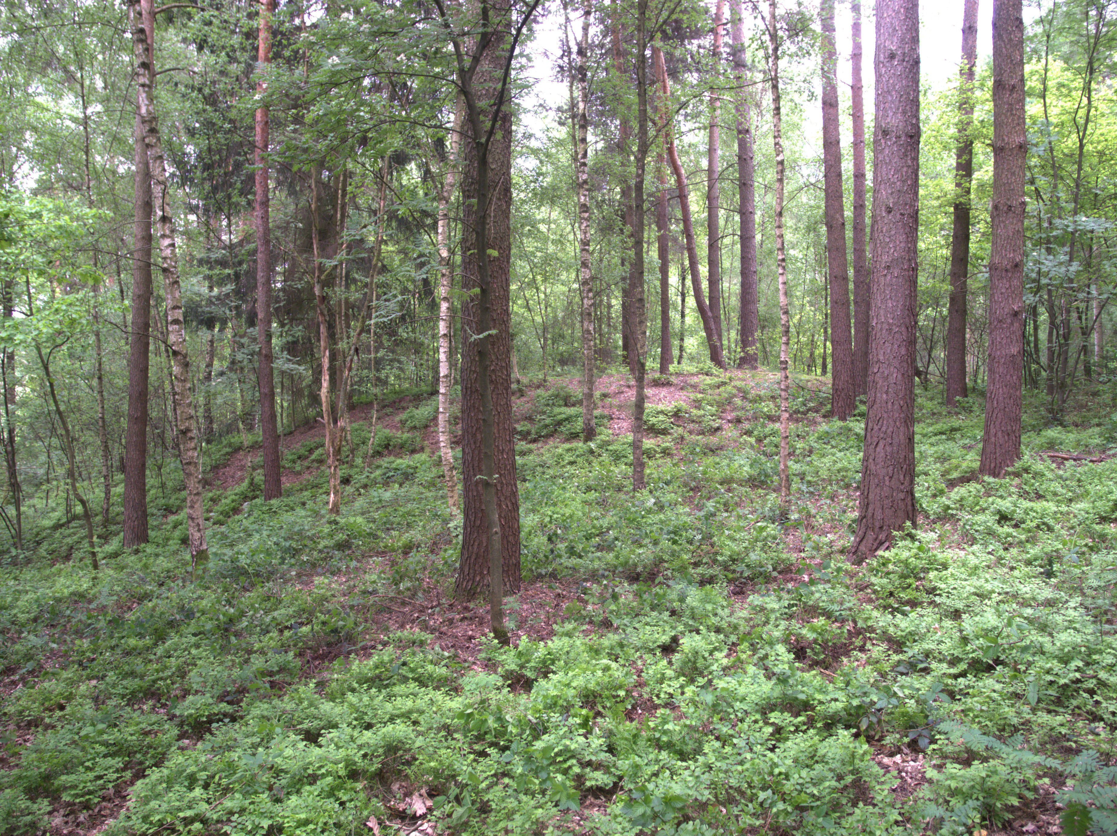 Turmhügel Simonshofen - Ansicht des Turmhügels aus nördlicher Richtung